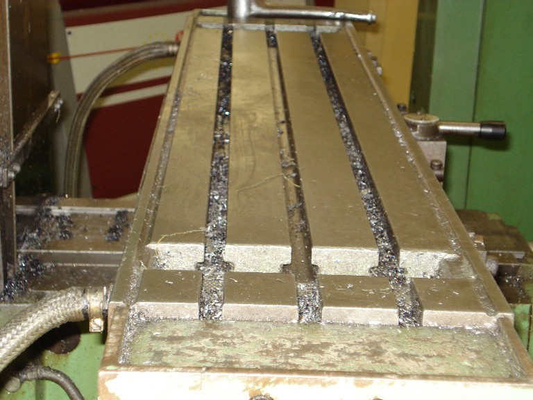 Detalle de la mesa de trabajo